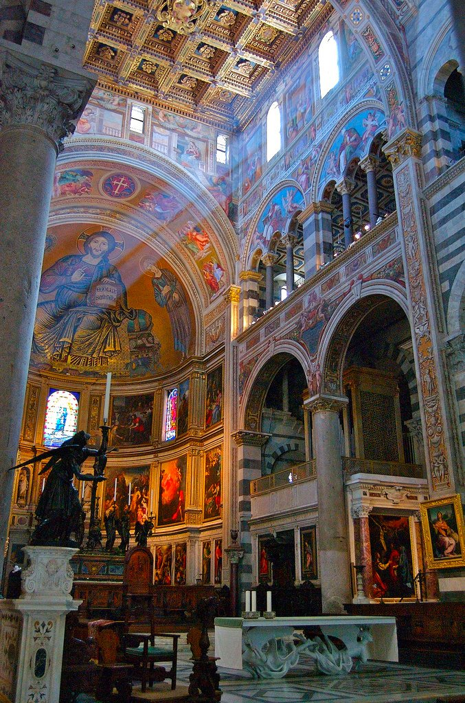 Duomo di Pisa